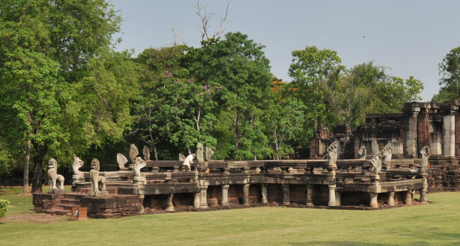 สะพานนาคราช ปราสาทหินพิมาย